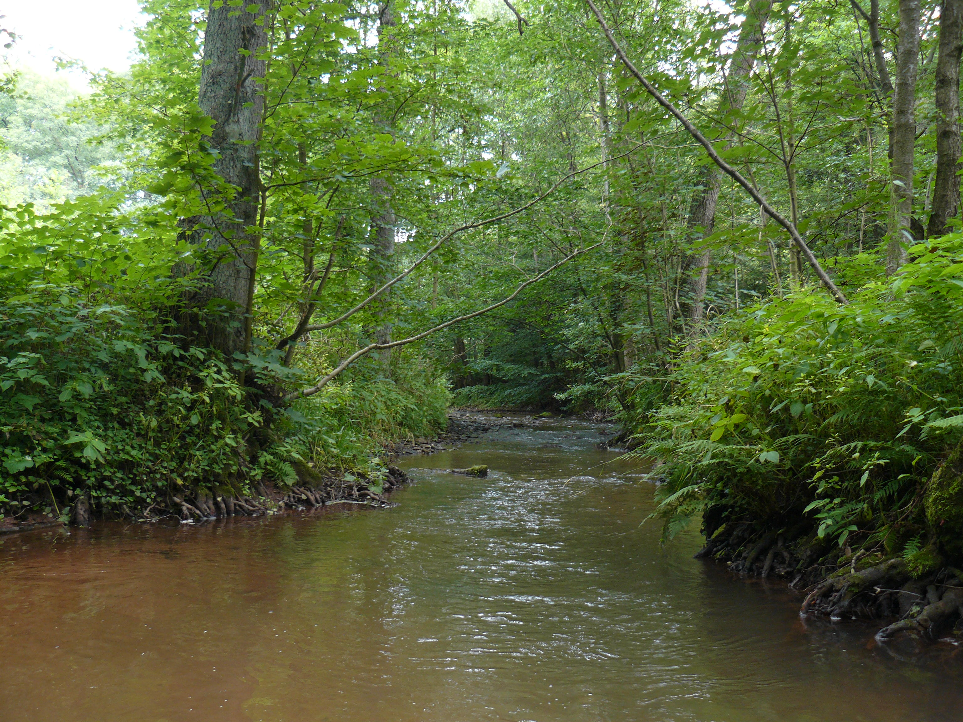 Údolí Javorky - přírodní památka